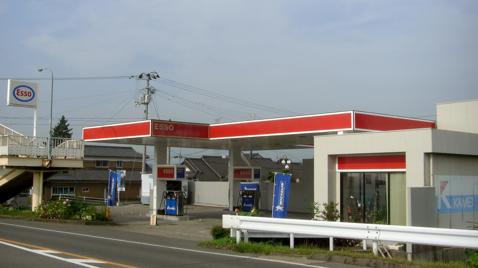 エッソ駒ケ嶺SS